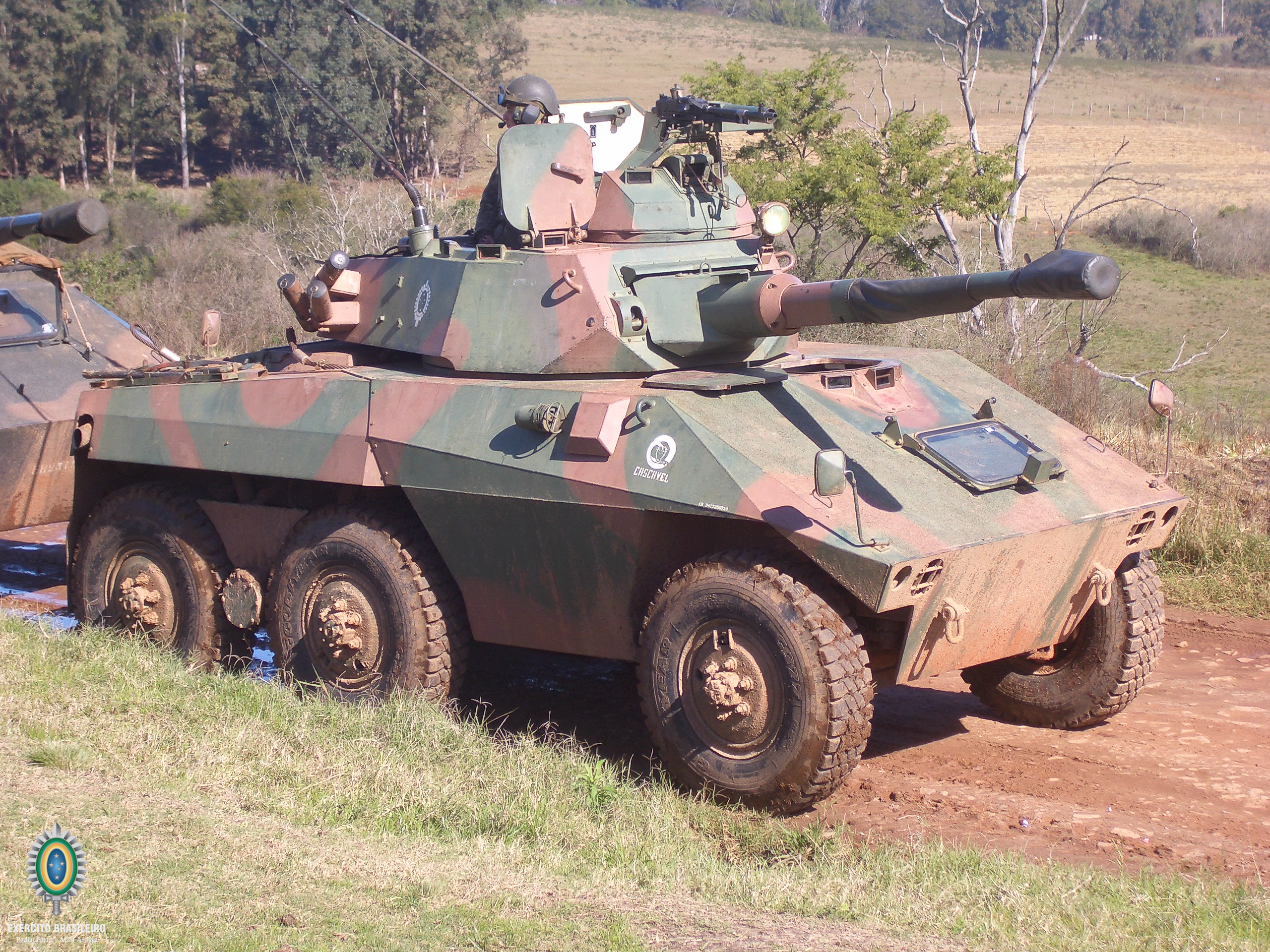 Cavalaria